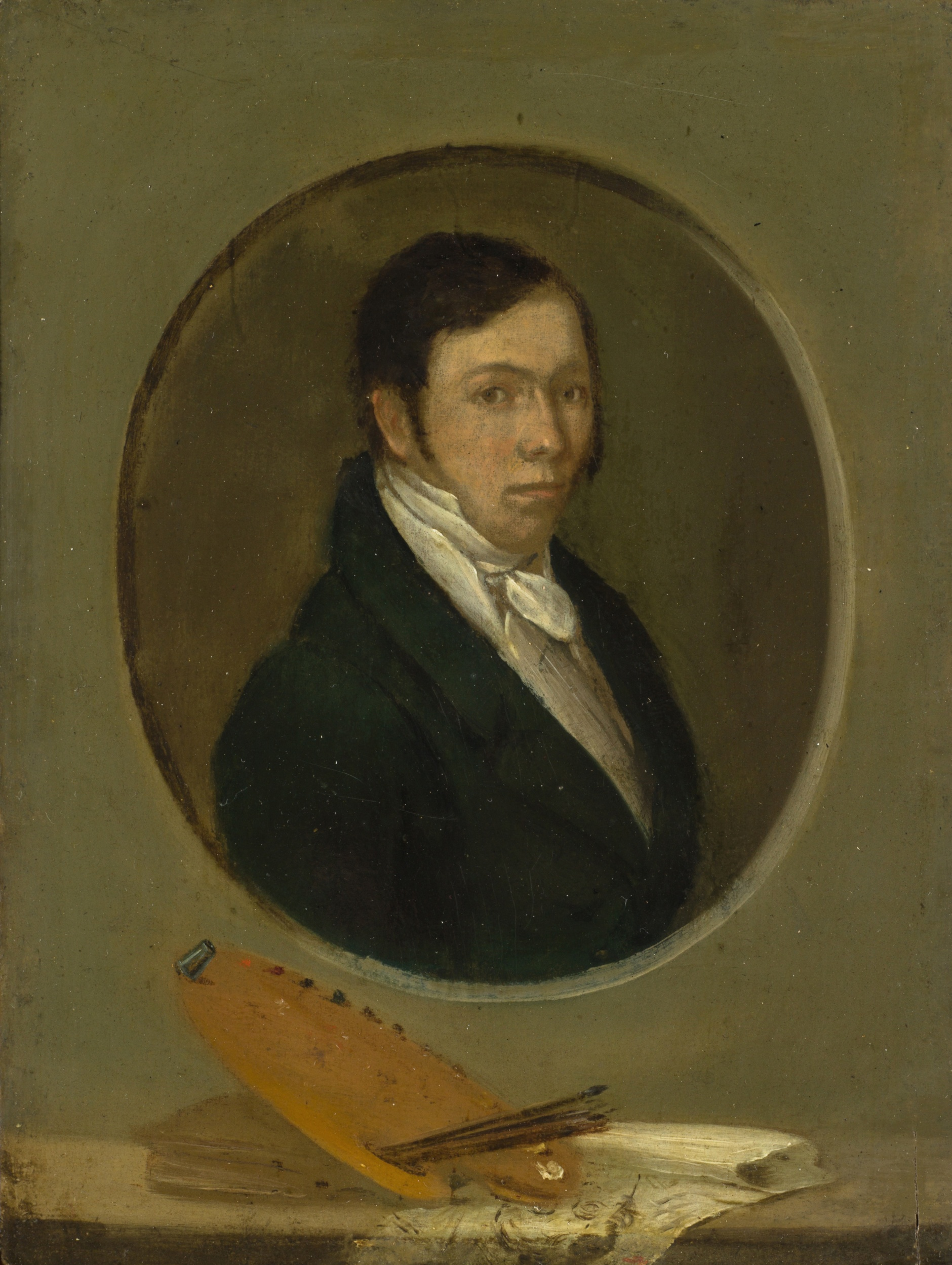 Hieronymus Hess (?): Bildnis des Samuel Birmann, 1819. HxB: 20.9 x 16 cm; Öl auf Holz. Kunstmuseum Basel, Inv. G 1997.13